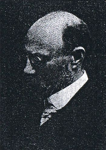 Emil Bahlsen (1862-1919), ingénieur allemand.